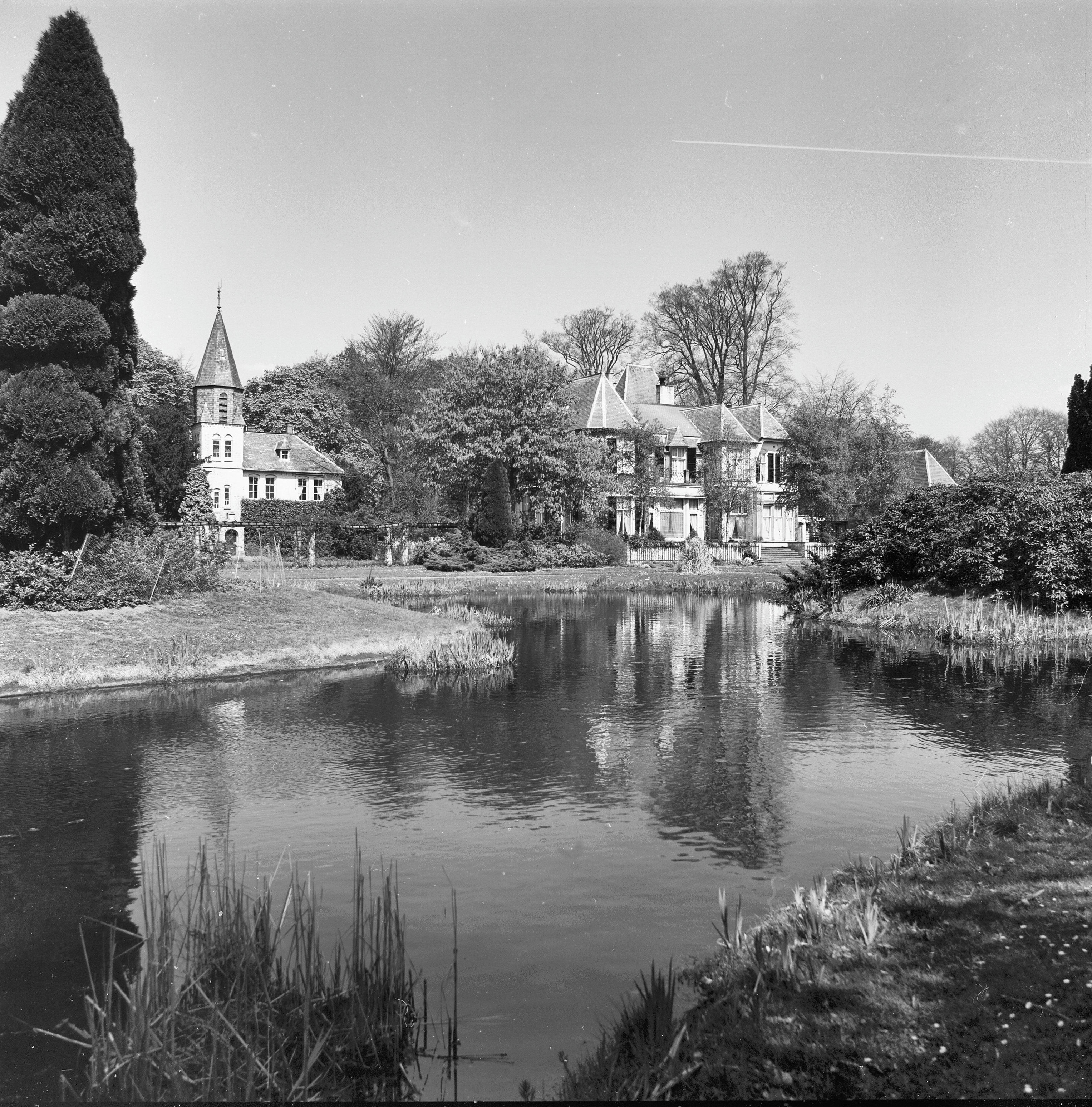 overzicht tuinzijde "Swaenenburgh"